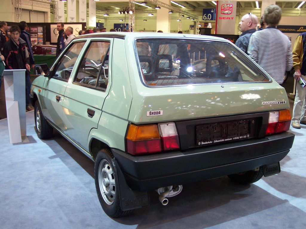 Škoda Favorit 136 L (Techno Classica Essen 2007)